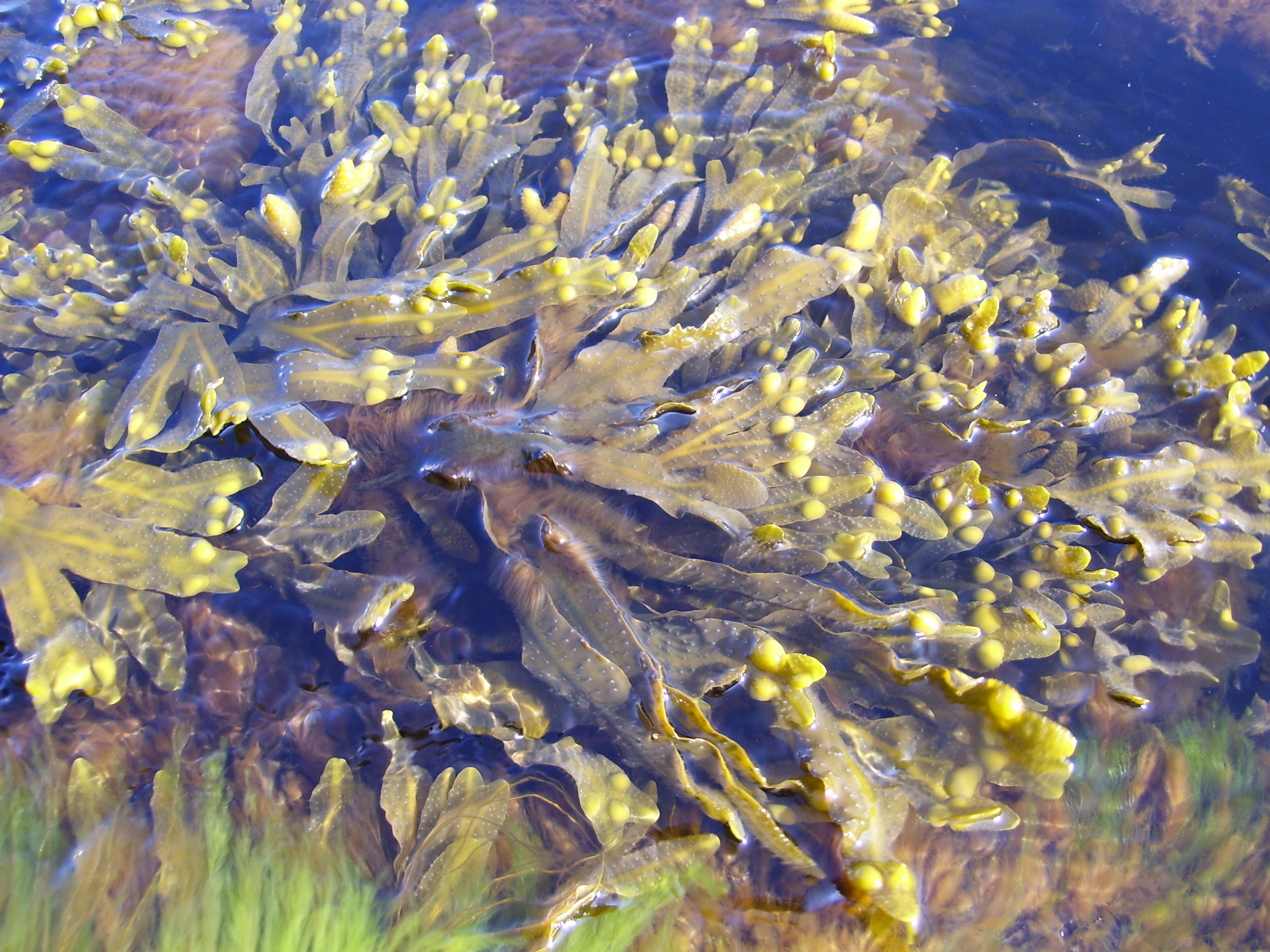 Morszczyn pęcherzykowaty - Bałtyk, wyspa Frederiksø (Ertholmene) / Fucus vesiculosus - Baltic sea: Frederiksø (Ertholmene)